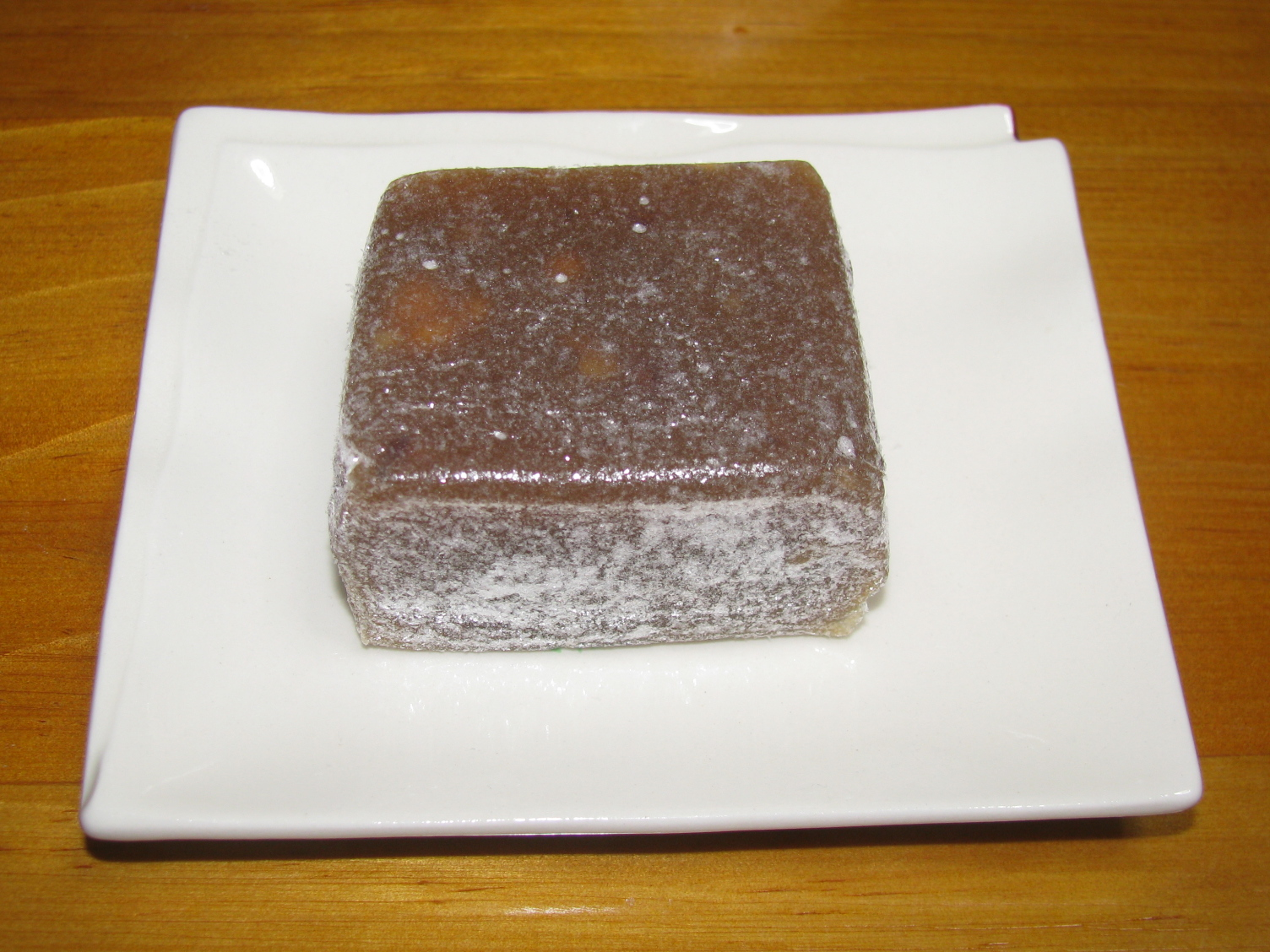 A kurumi yubeshi; local wagashi from Sendai.